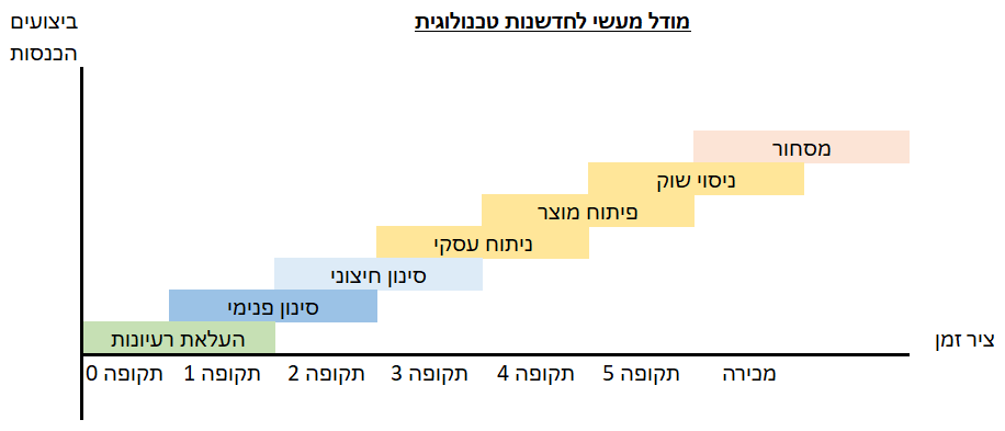 התפתחות טכנולוגית חדשנית